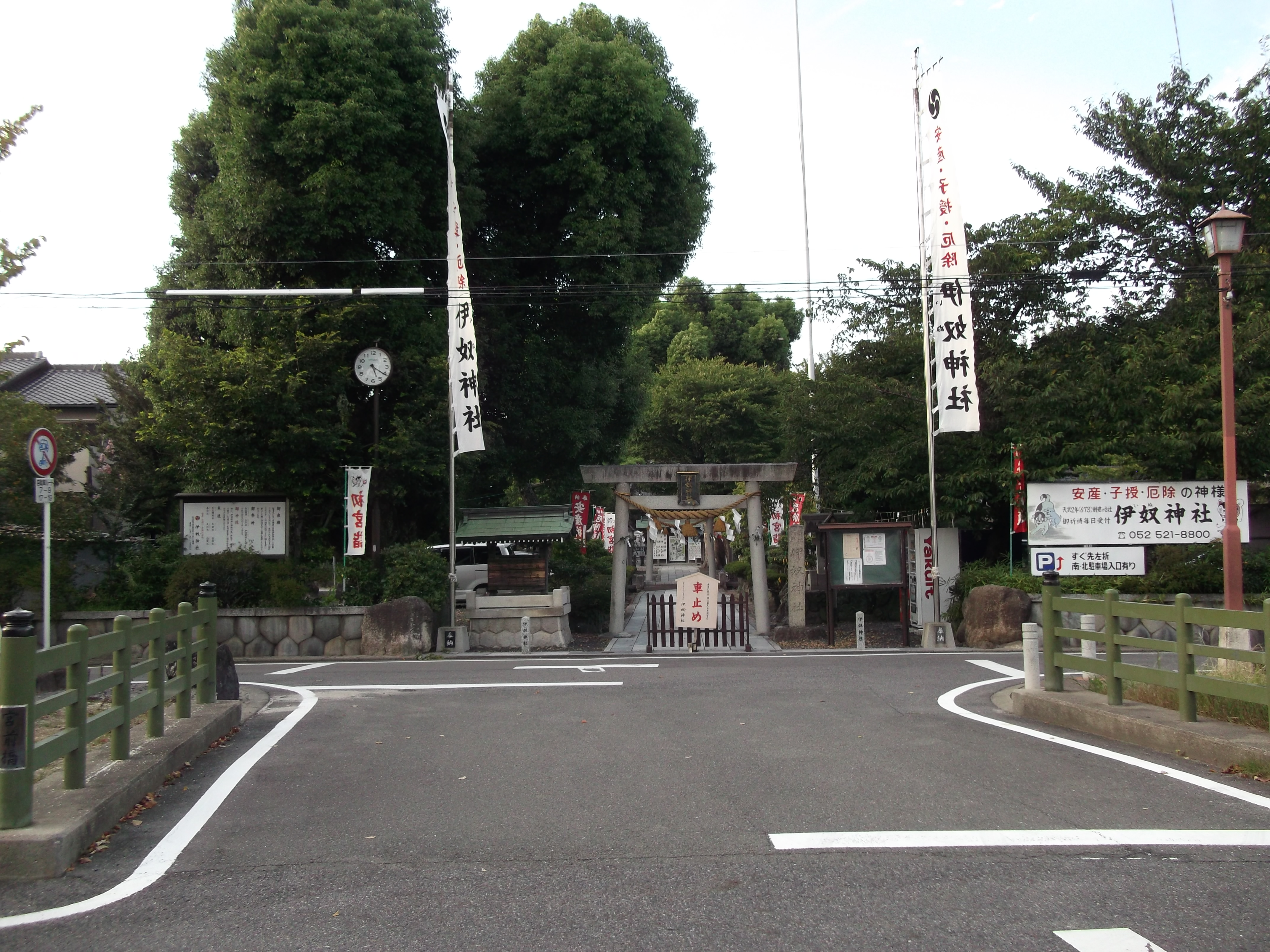 名古屋市西区稲生町に鎮座する伊奴神社と庄内用水路（惣兵衛川）宮前橋